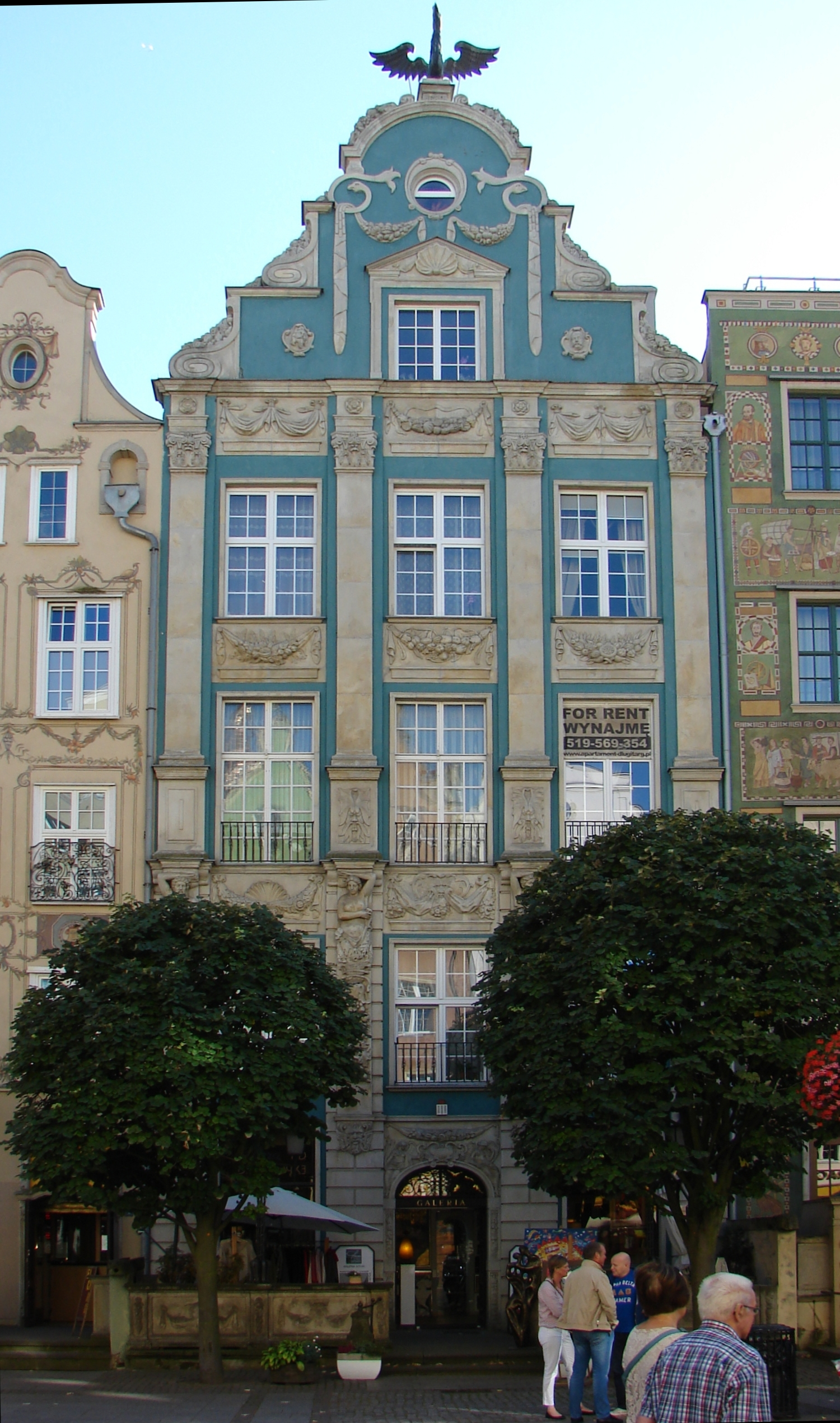 Gdańsk, dom, 1680, 1853-1955